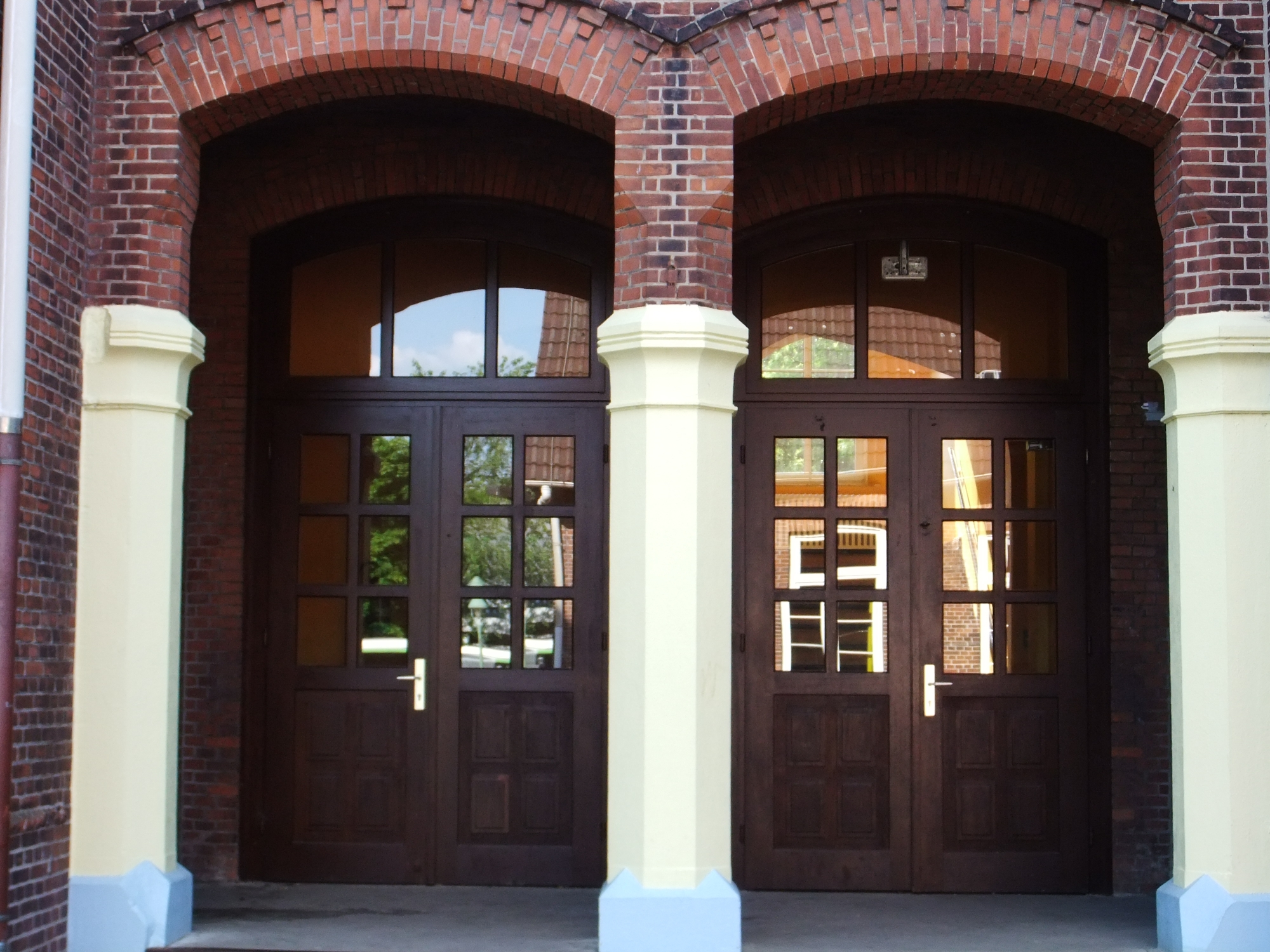 Reformierte Schule, Schulhaus in Bremerhaven, Lange Straße 88.Das abgebildete Objekt ist ein geschütztes Kulturdenkmal in der Freien Hansestadt Bremen, mit der Nr. 1876 beim Landesamt für Denkmalpflege registriert.